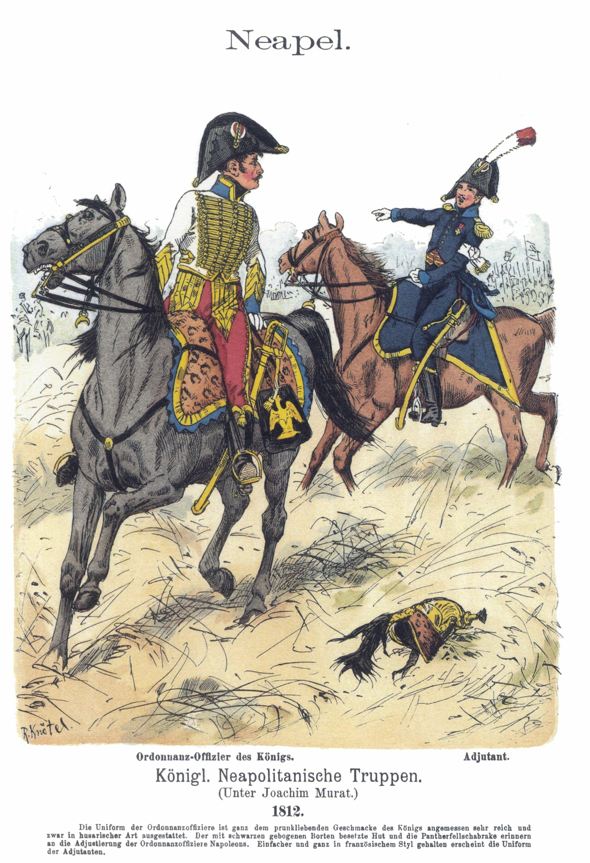 Officier d'ordonnance (à gauche) et adjudant de l'armée napolitaine, 1812.